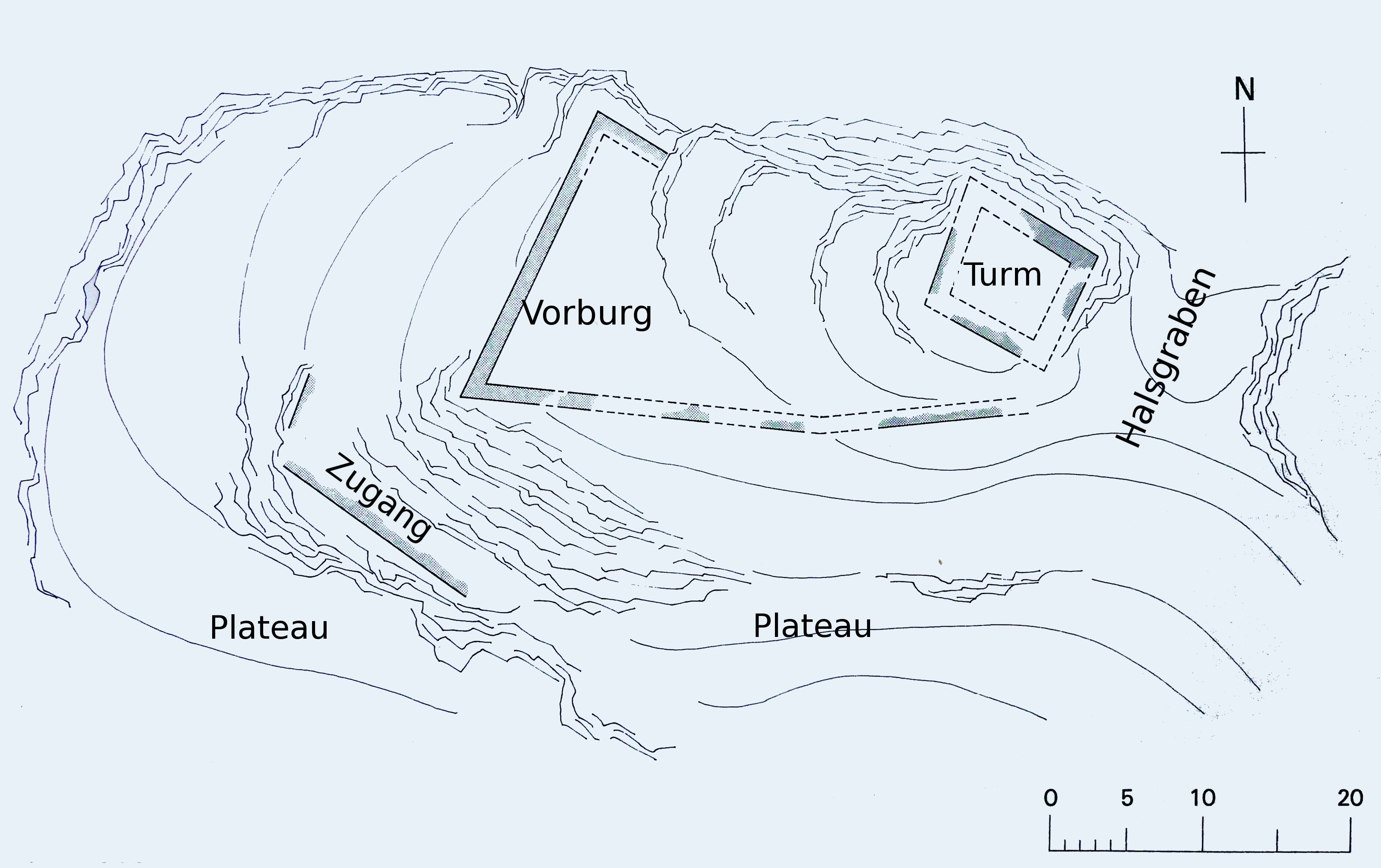 Übersichtsplan Balcun At